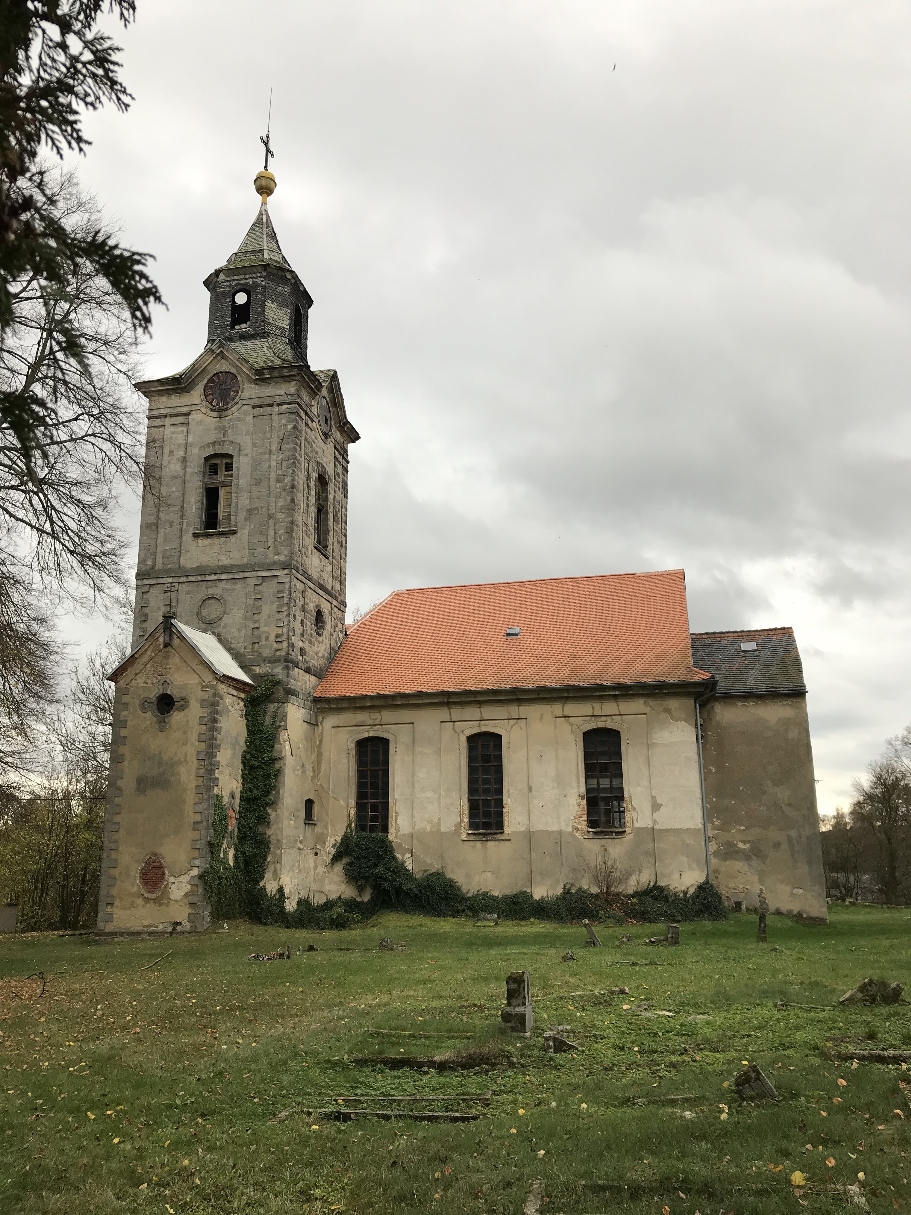 Kostel v Lindavě z boku, pohled ze hřbitova v roce 2019